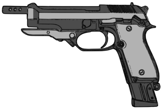 Beretta 93R, Italian machine pistol